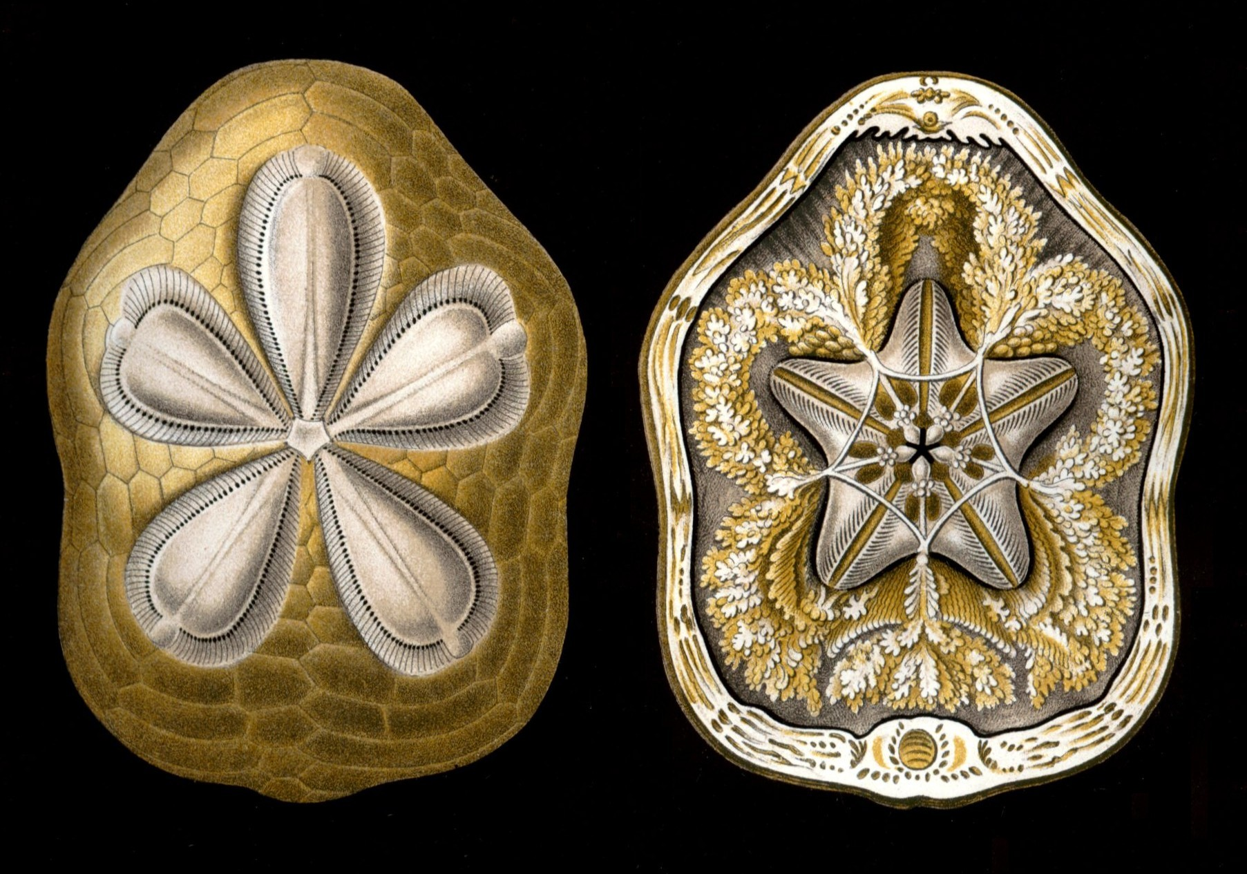 Clypeaster rosaceus (Linnaeus, 1758), shell without spines from above Clypeaster rosaceus (Linnaeus, 1758), internal organs from above